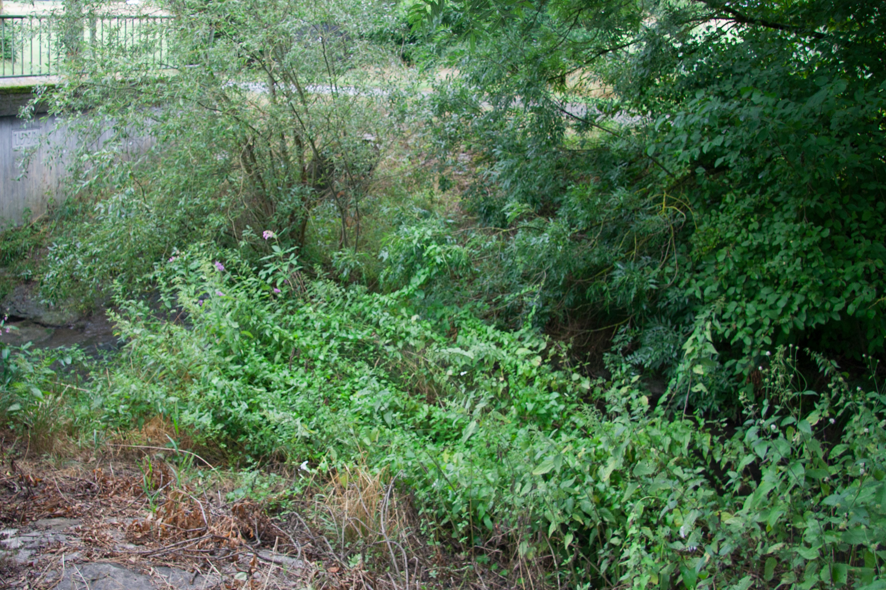 Mündungsbereich des Mettenbachs in den Erlenbach